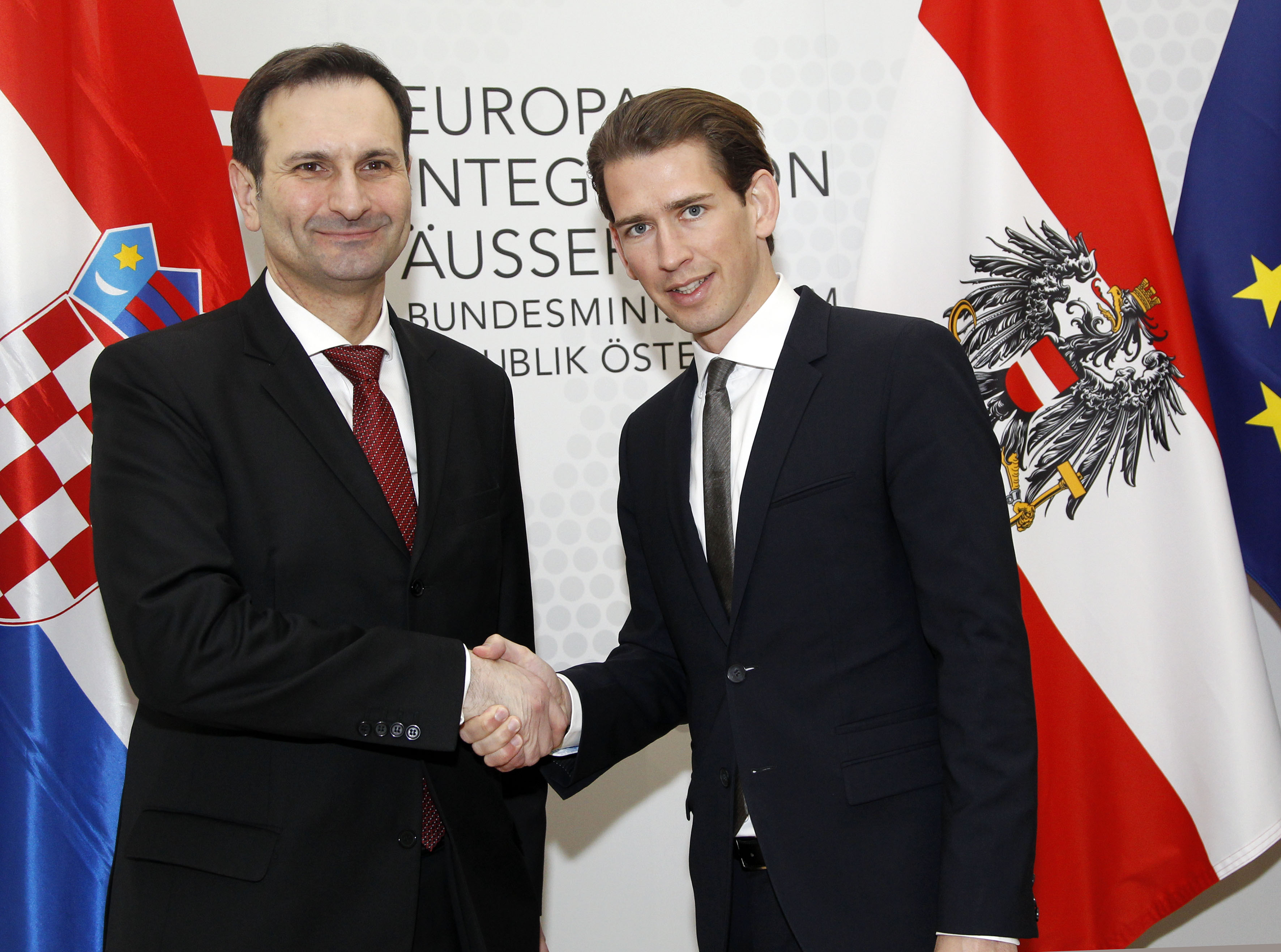 Freitag; den 1. April 2016 traf Außenminister Sebastian Kurz im Außenministerium in Wien mit dem Außenminister von Kroatien Miro Kovac; zu einem Arbeitsgespräch zusammen. Foto: Mahmoud